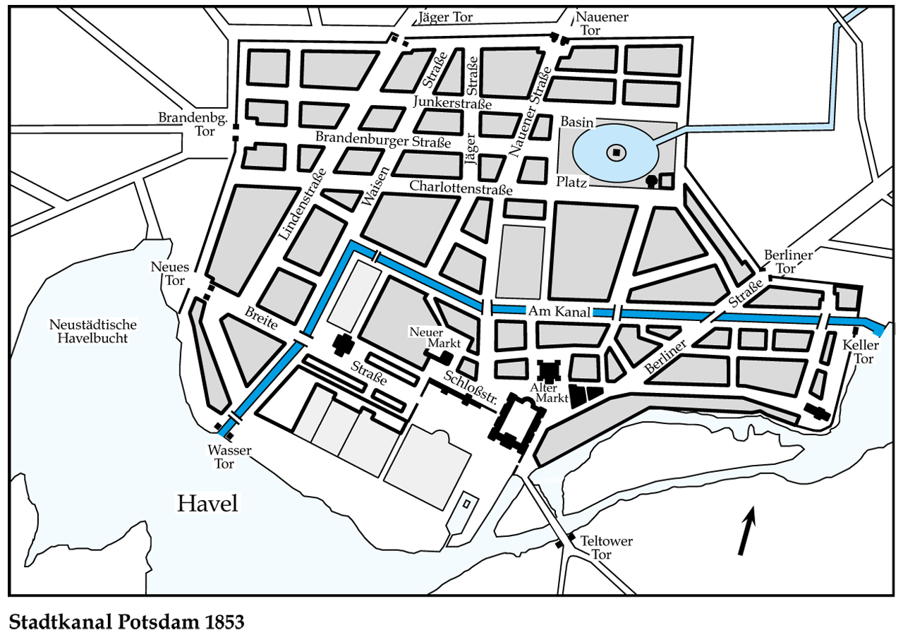 Grafik Verlauf Stadtkanal Potsdam 1853